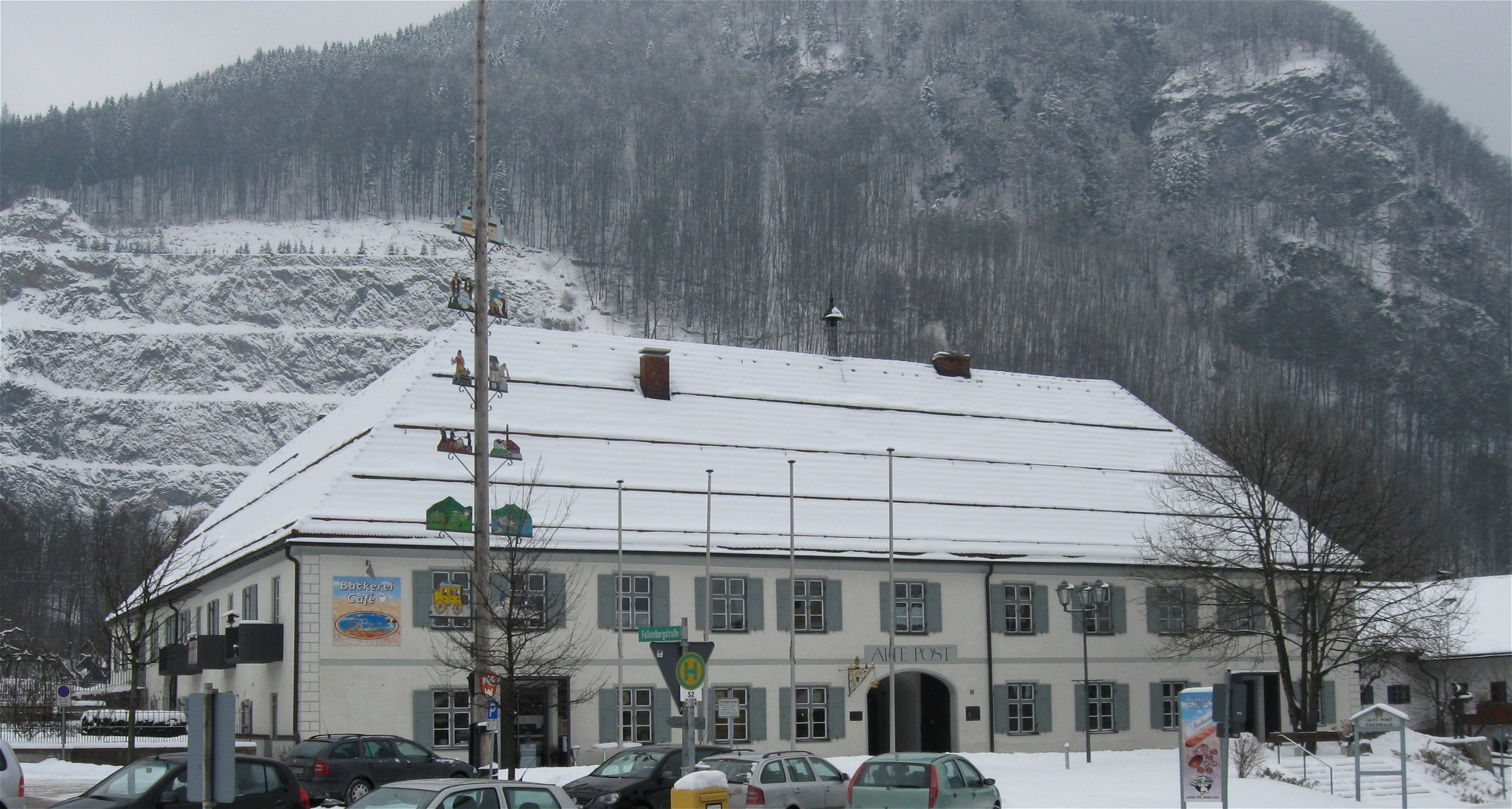 Kufsteiner Straße 84, Fischbach; ehem. Gasthof, stattliche Vierflügelanlage, zweigeschossig, mit Steilwalmdächern, 1815